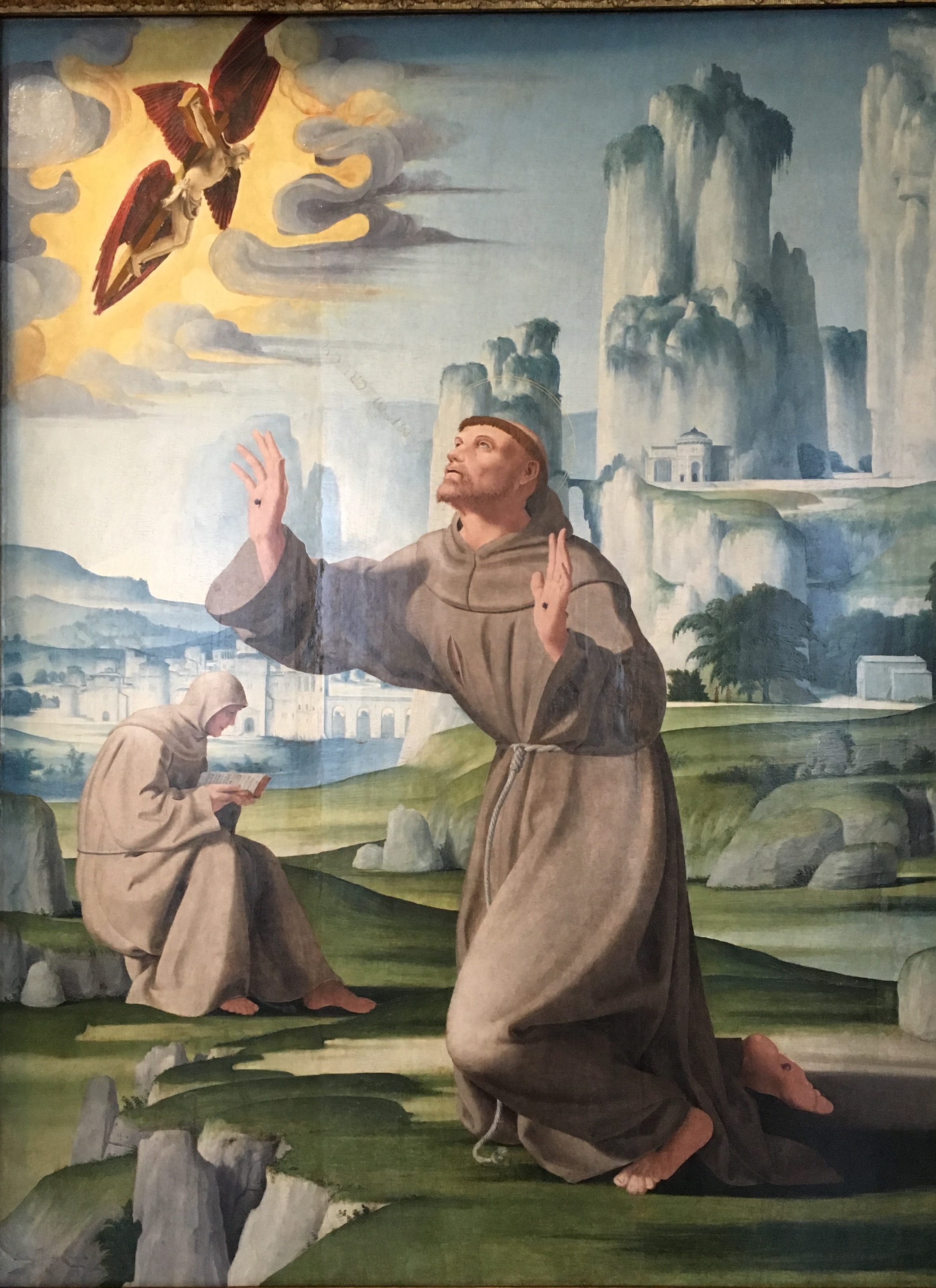 Stimmate di San Francesco.label QS:Lit,"Stimmate di San Francesco."